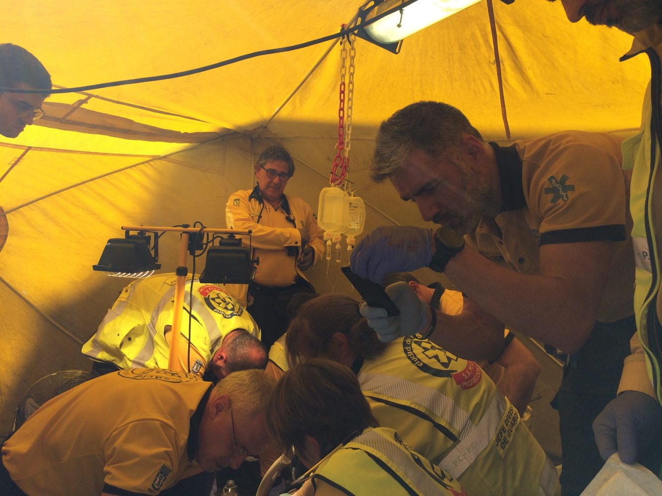 SAMUR-Protección Civil, 25 años llevando el hospital a la calle